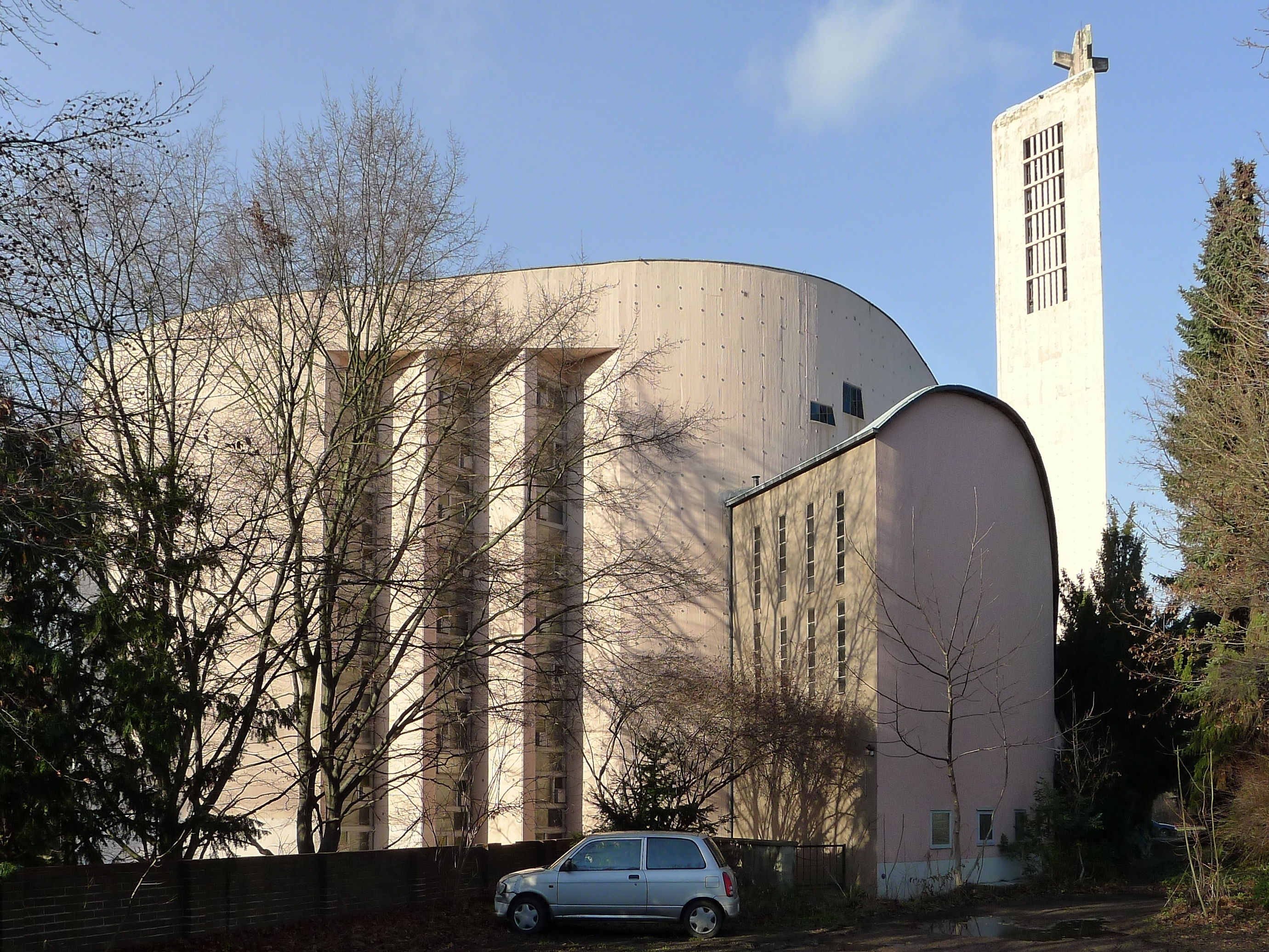 Ostseite der Kirche, rechts die Sakristei